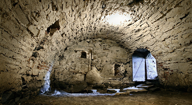 Pirun kellariksi kutsuttu 1400-luvun lopulla rakennetun Kurkien kivilinnan kellari. Kuva: Raija Kolehmainen.